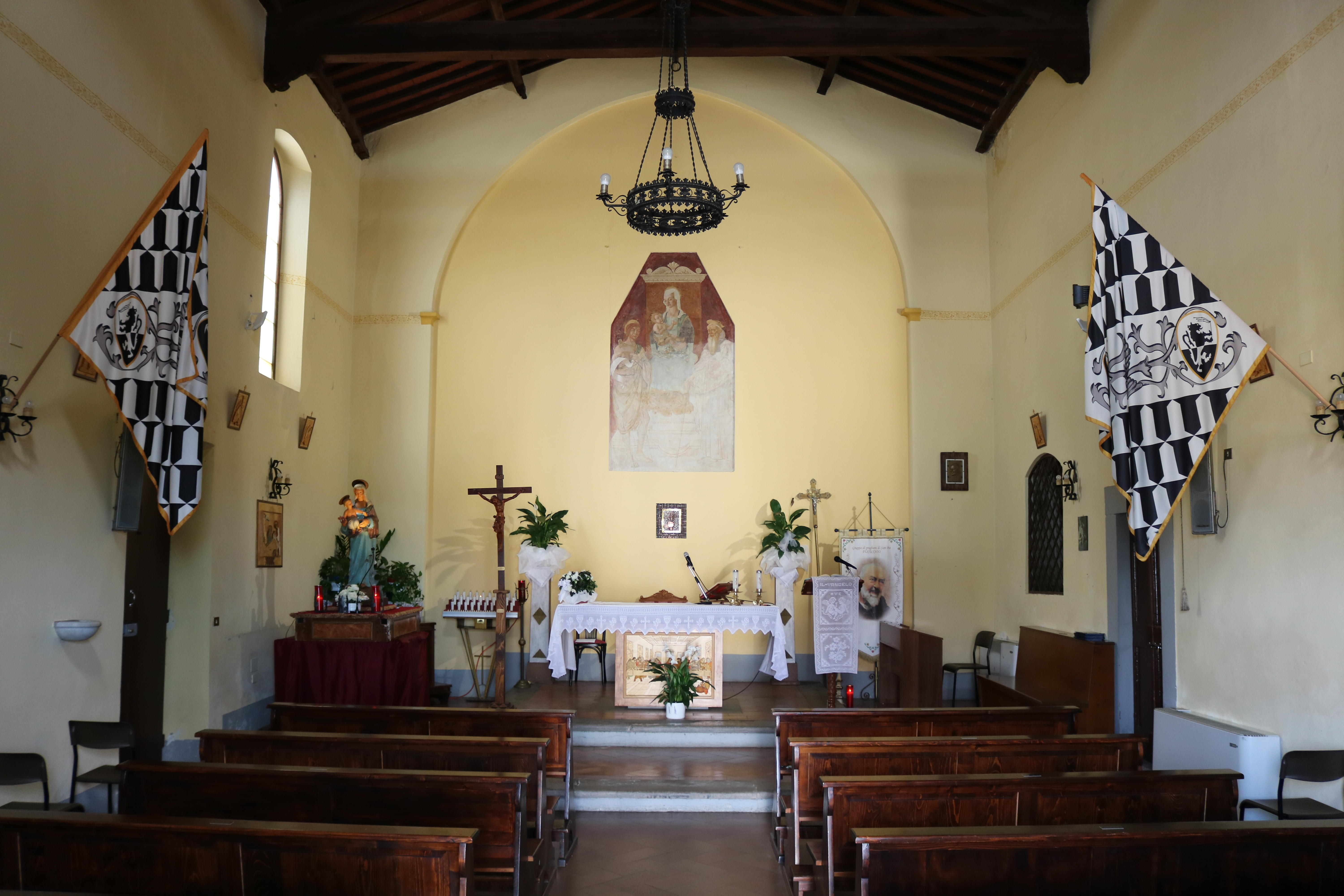 Interno della chiesa della vedine della Ferruzza (Fucecchio)